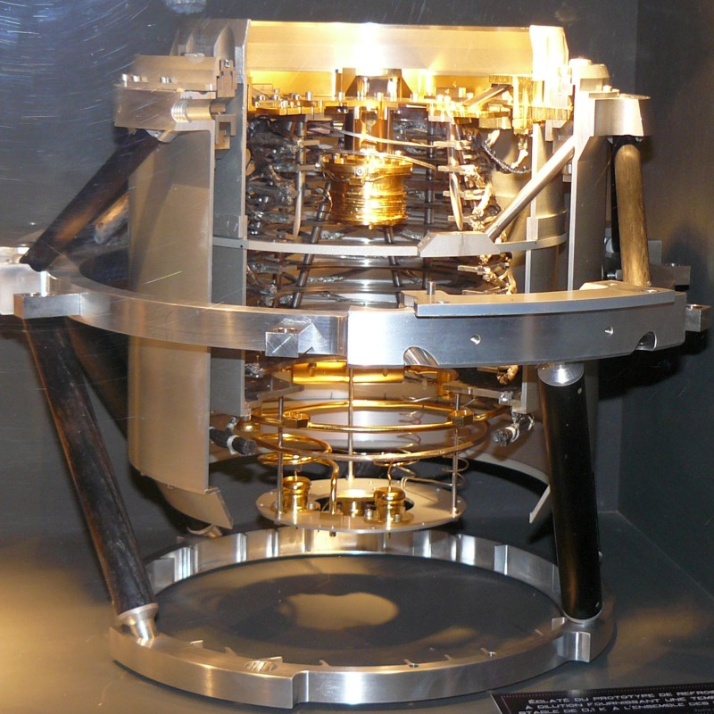 Eclaté du prototype du refroidisseur HFI de Planck